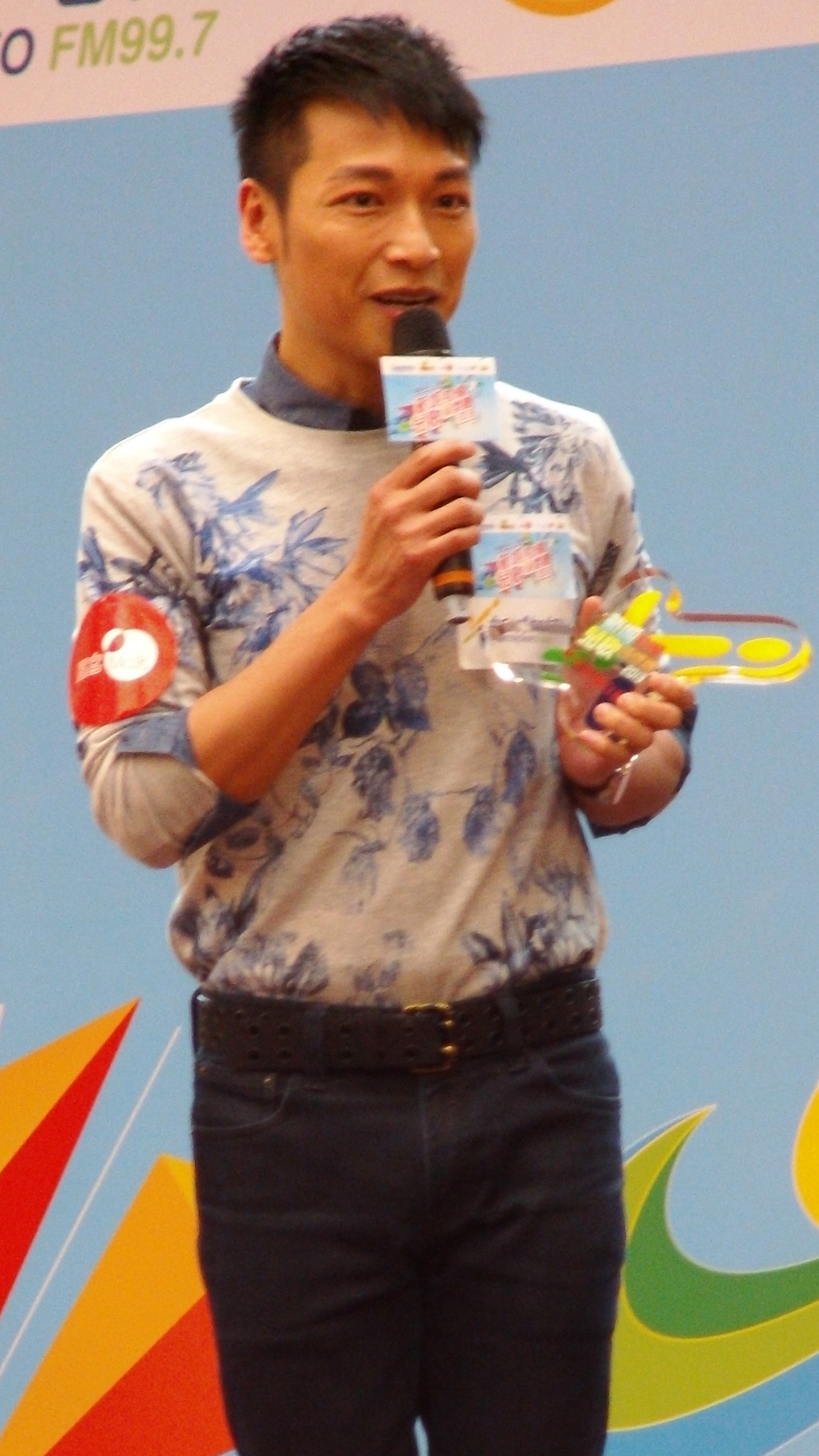 中文（香港）: 譚偉權的樣子